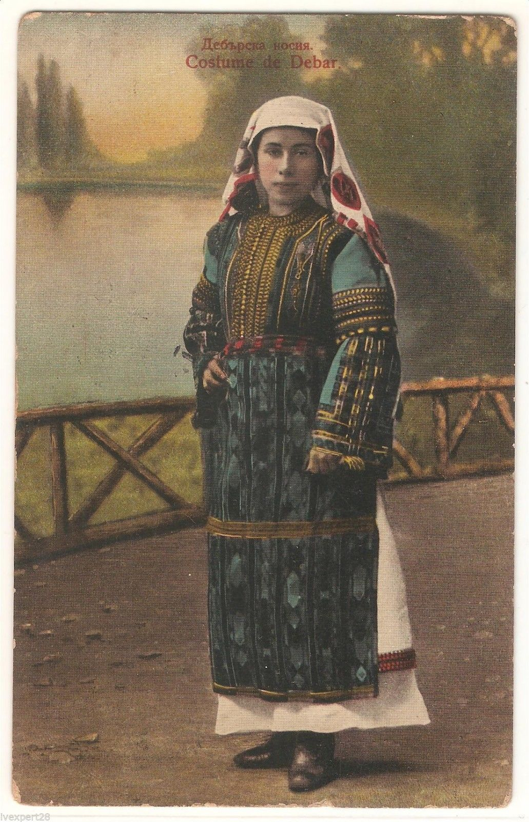 Дебарска Носија